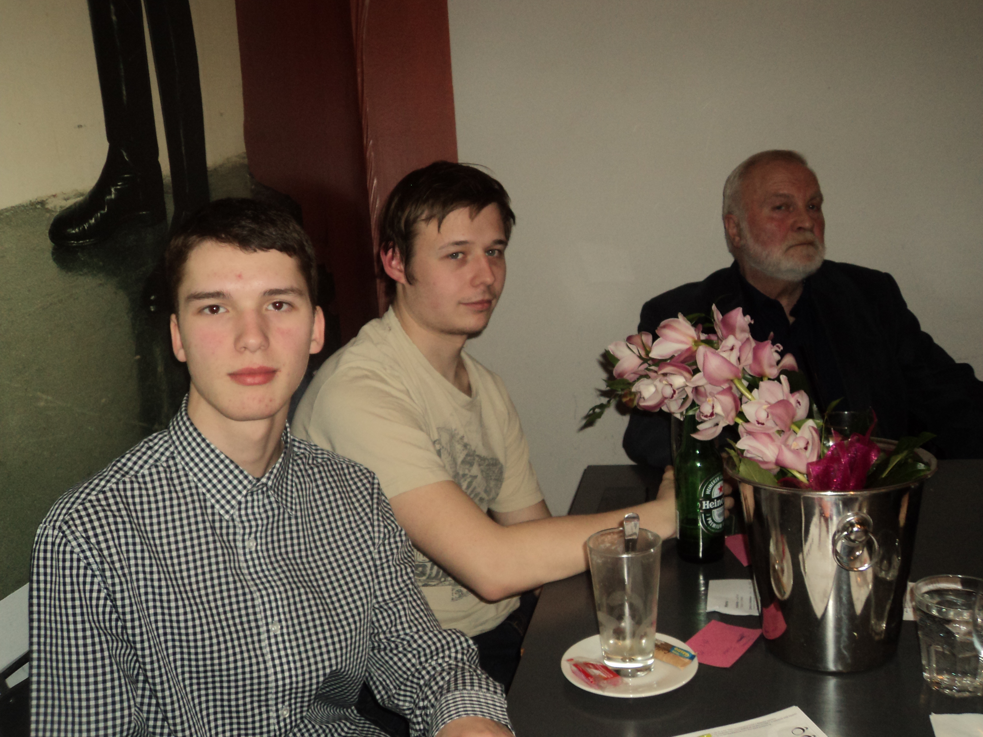 Soutěžíci na Pub quizovém večeru